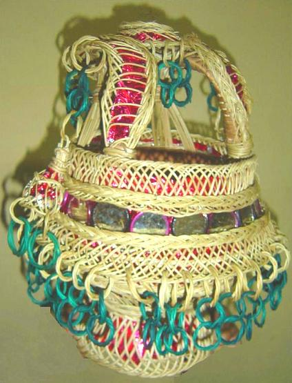 Kashmiri Kanger